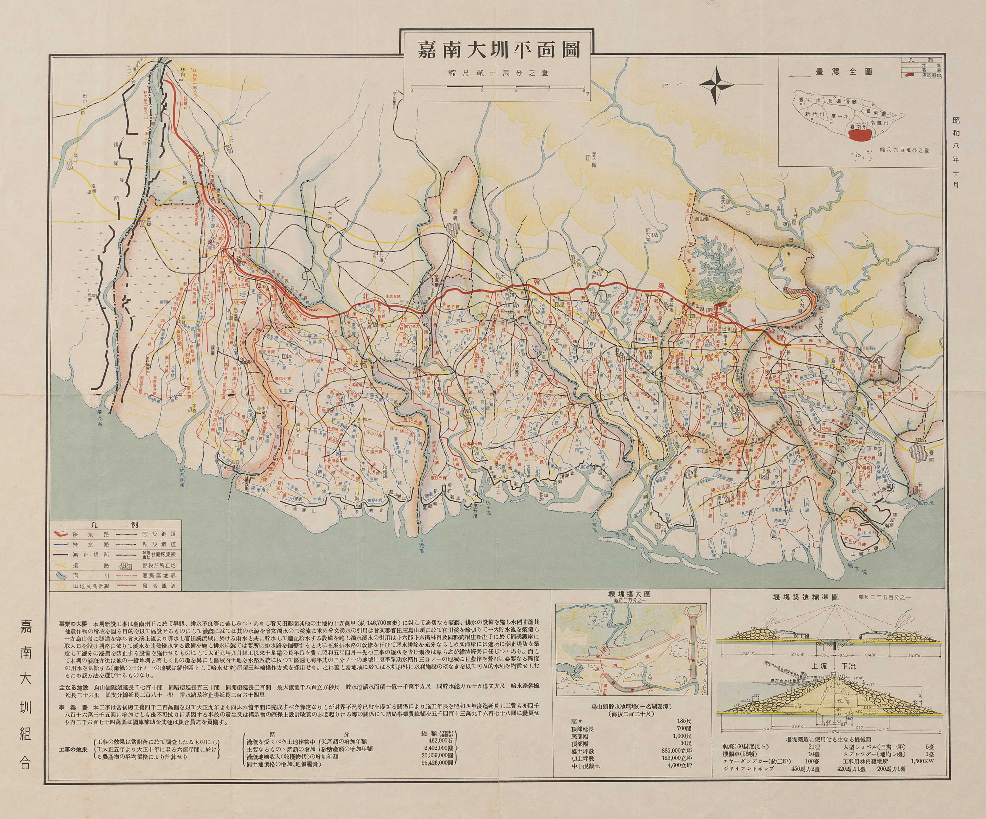 詳見圖說等。